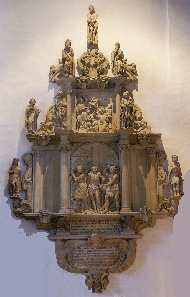 Mindener Dom, Epitaph des Hieronymus von Grappendorf.